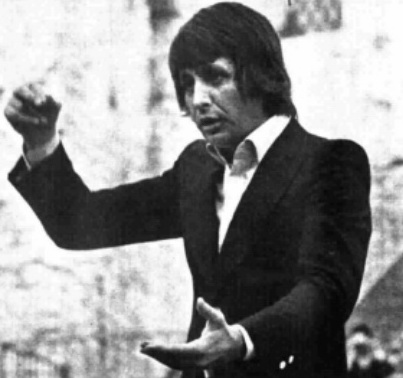 Italian conductor Maurizio Rinaldi directs a RAI concert